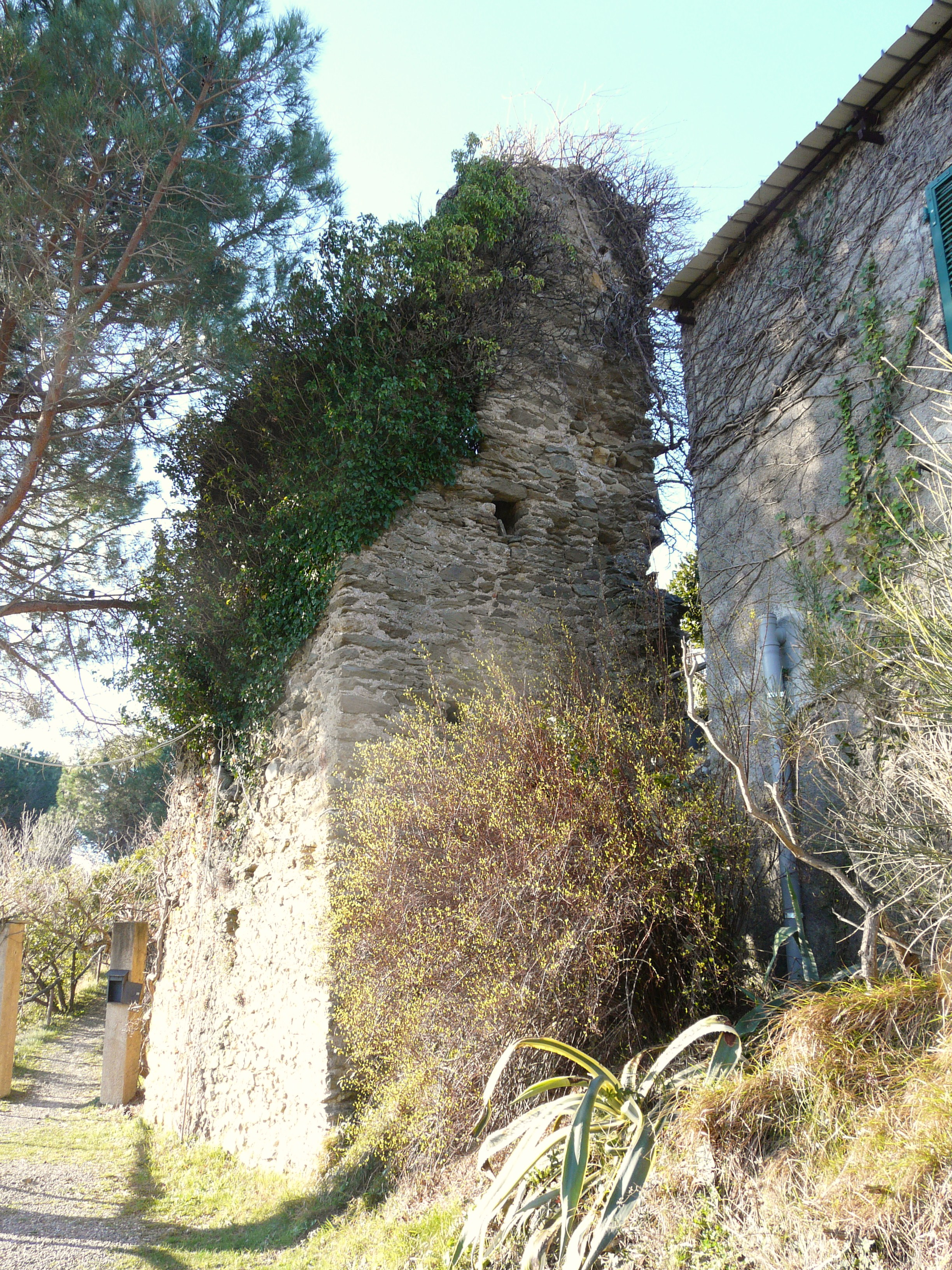 Castellaro, Vendone, Liguria, Italia